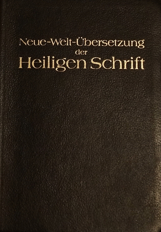 Neue-Welt-Übersetzung (deutsch)